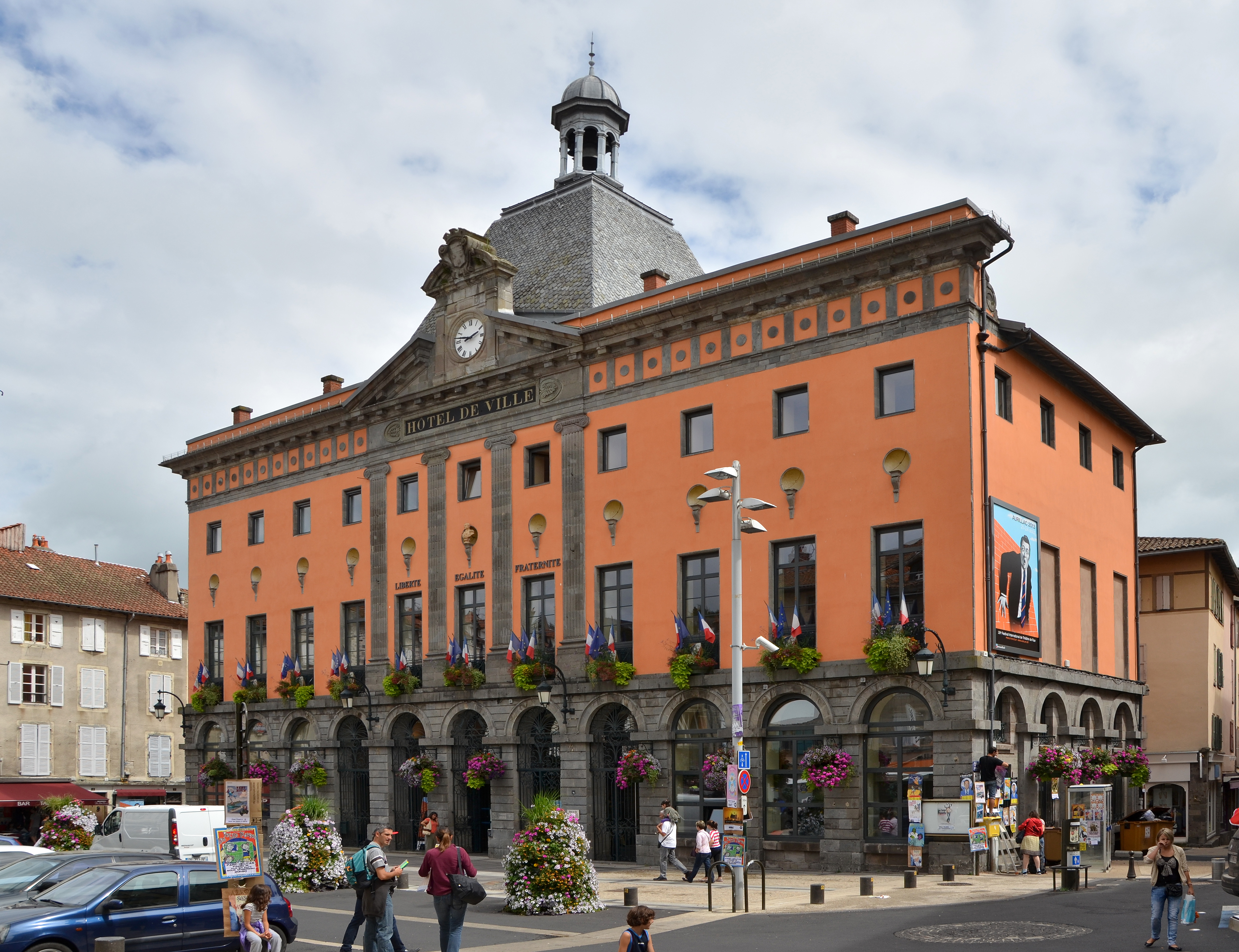 Hôtel de ville d'Aurillac, Cantal, France .